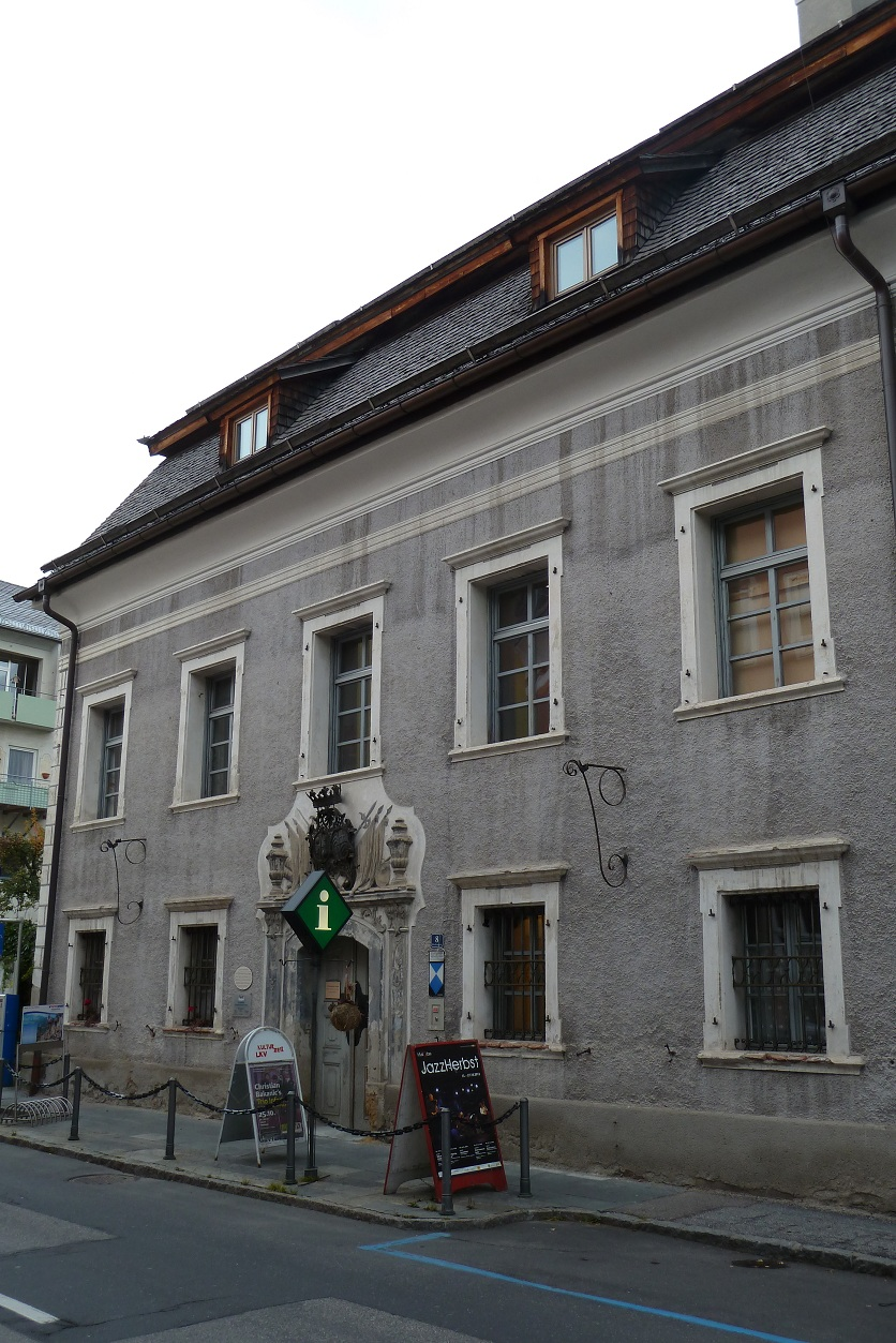 Schloss Kuenburg, Vorderseite von Kirchengasse aus gesehen